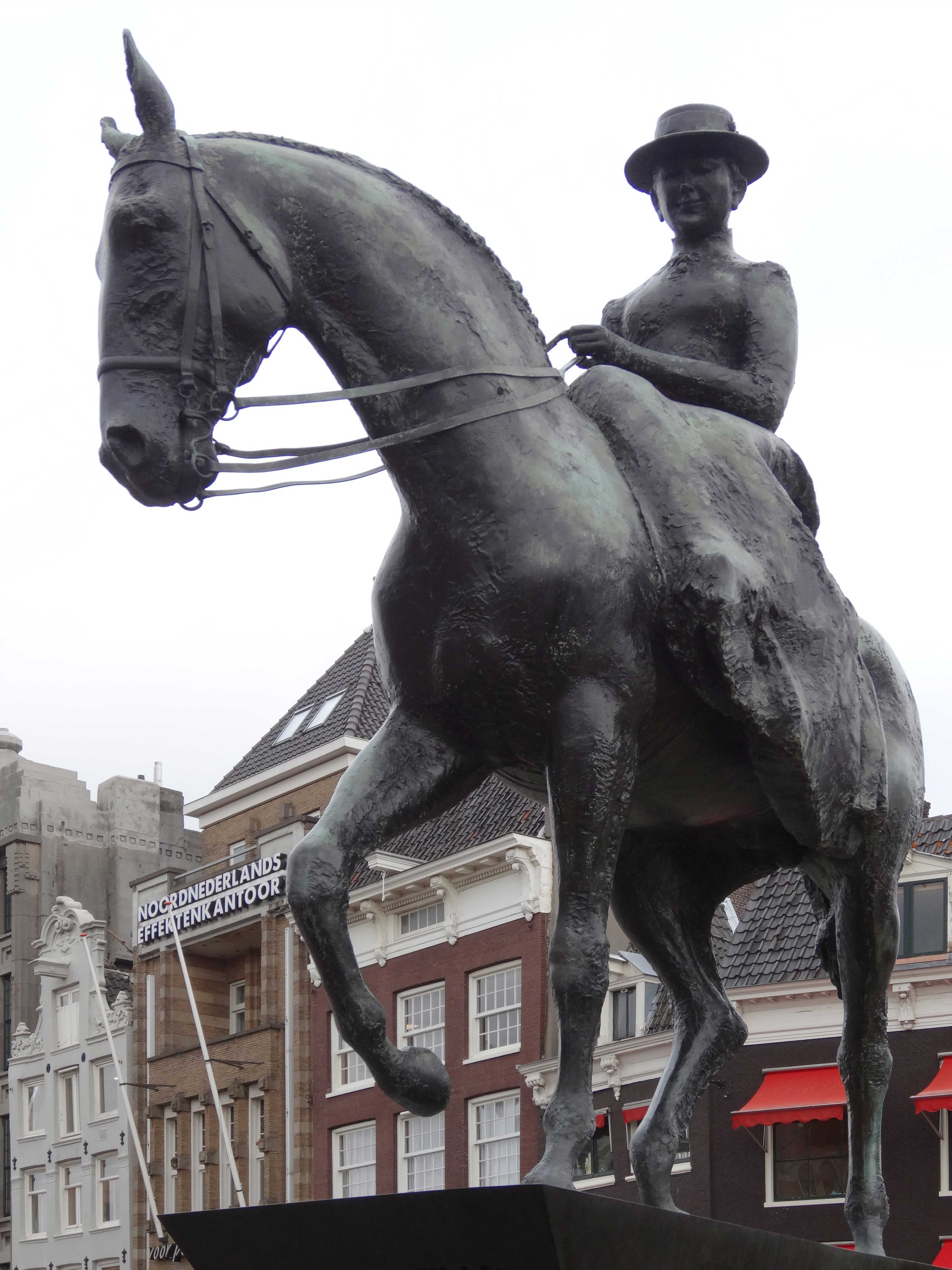 Wilhelmina te paard op het Rokin te Amsterdam door Theresia van der Pant